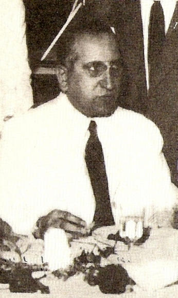 Angel Borlenghi.